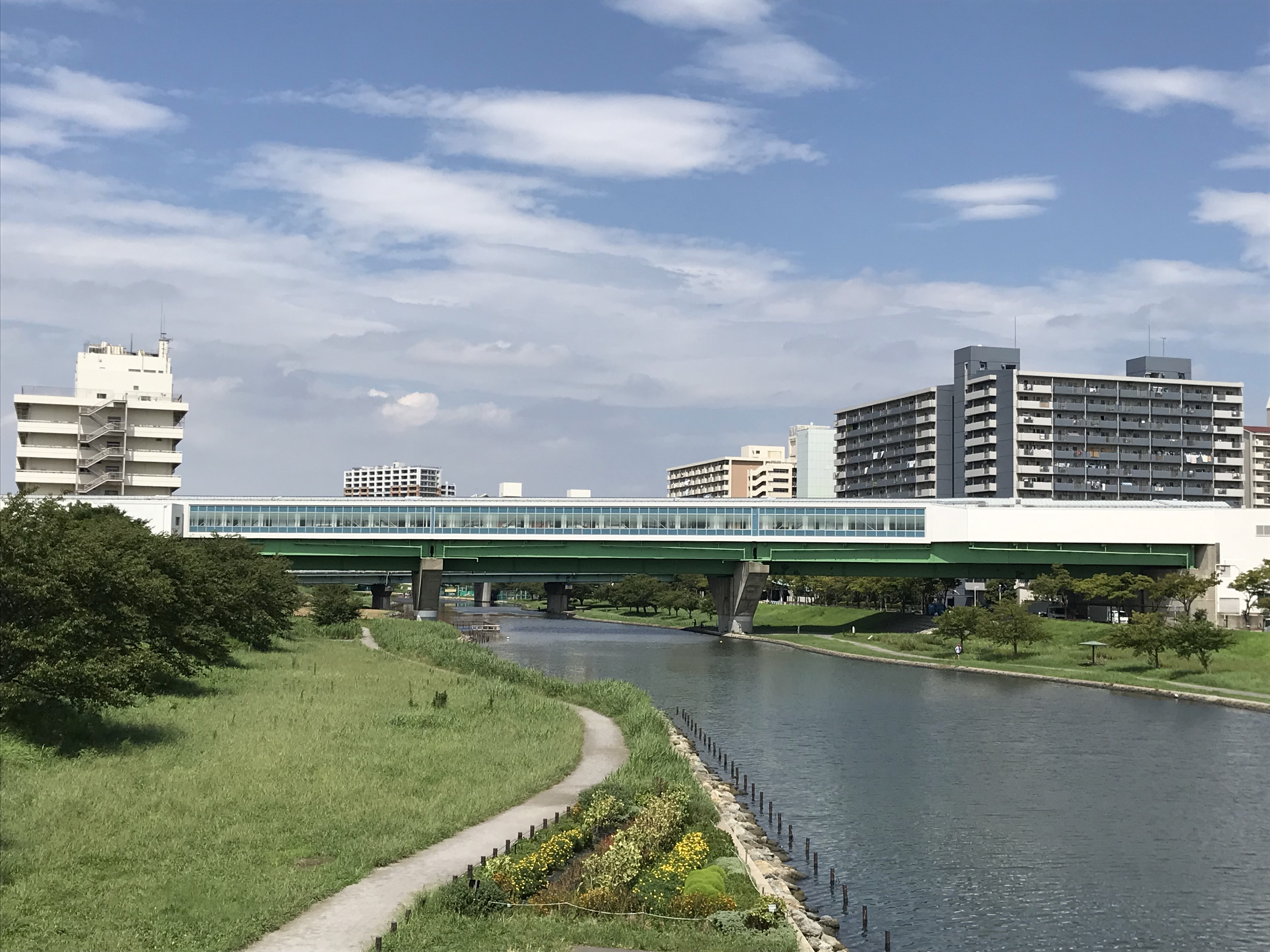 都営地下鉄新宿線東大島駅舎（中川大橋から見た）